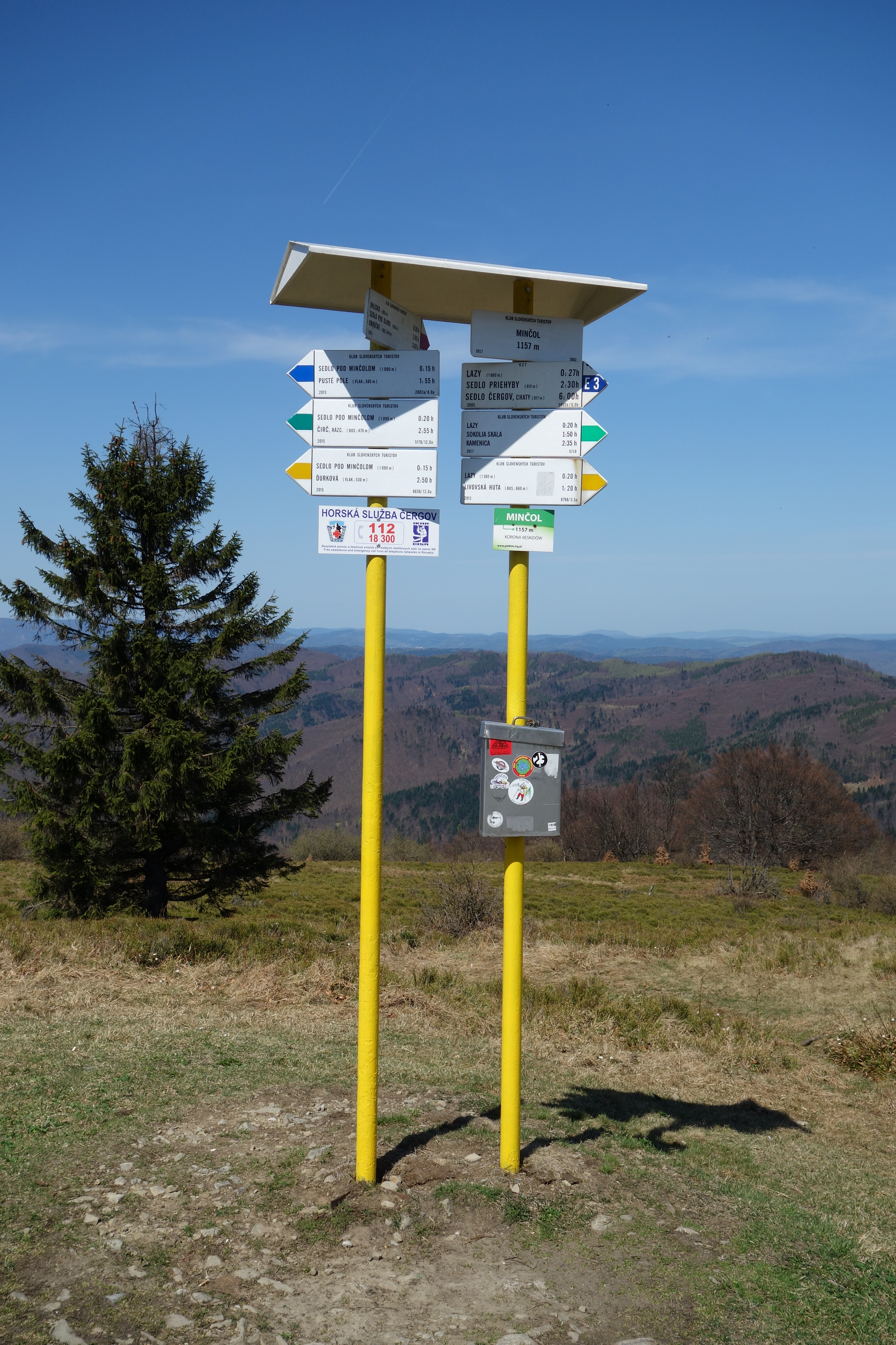 Unikátny dvojitý turistický smerovník na vrchole Minčola This is a photography of Natura 2000 protected area with ID SKUEV0331